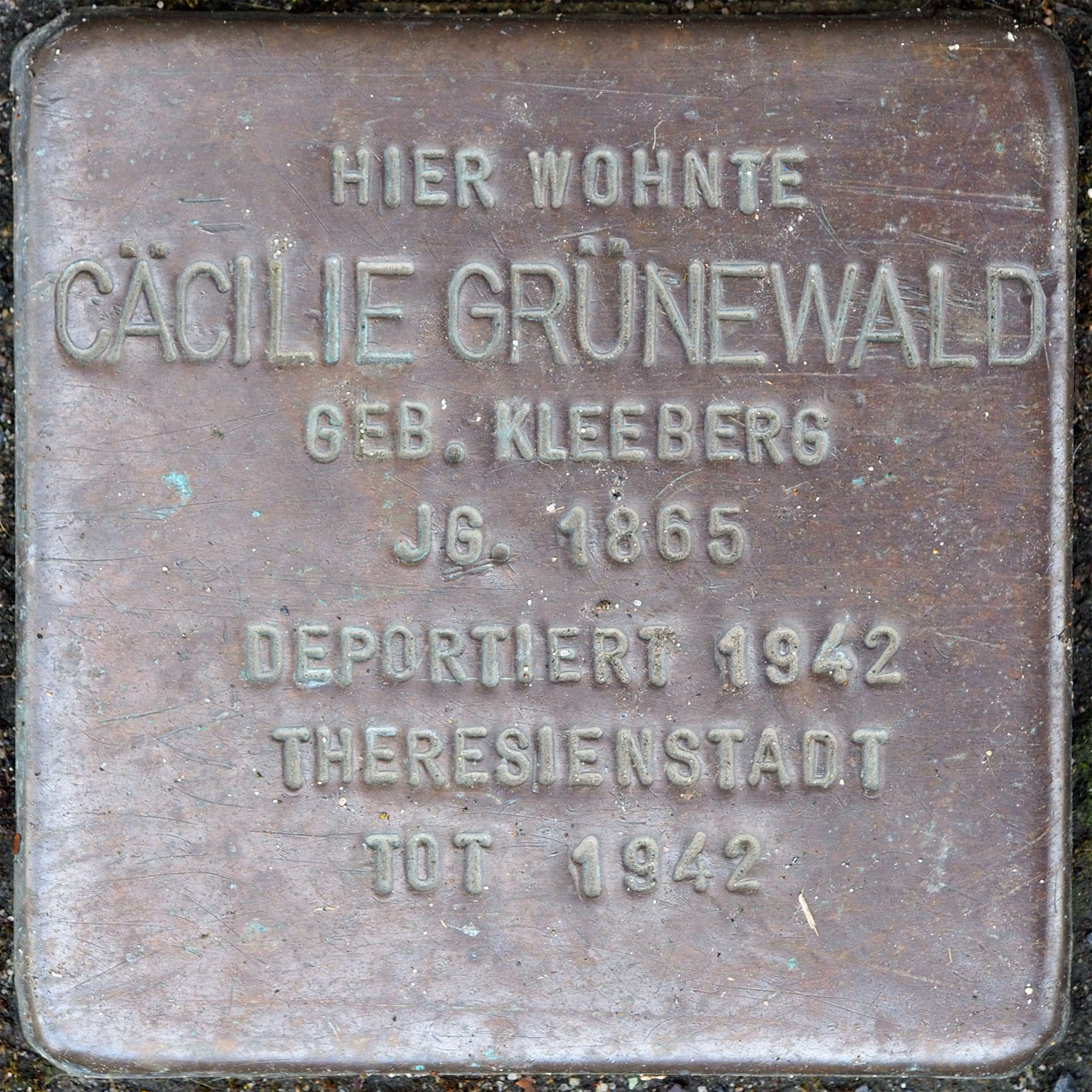 Stolpersteine MG: Grünewald, Cäcilie